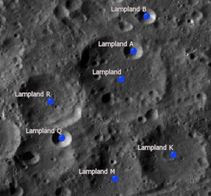 Cráter lunar Lampland. Cráteres satélite. (Imagen LRO)